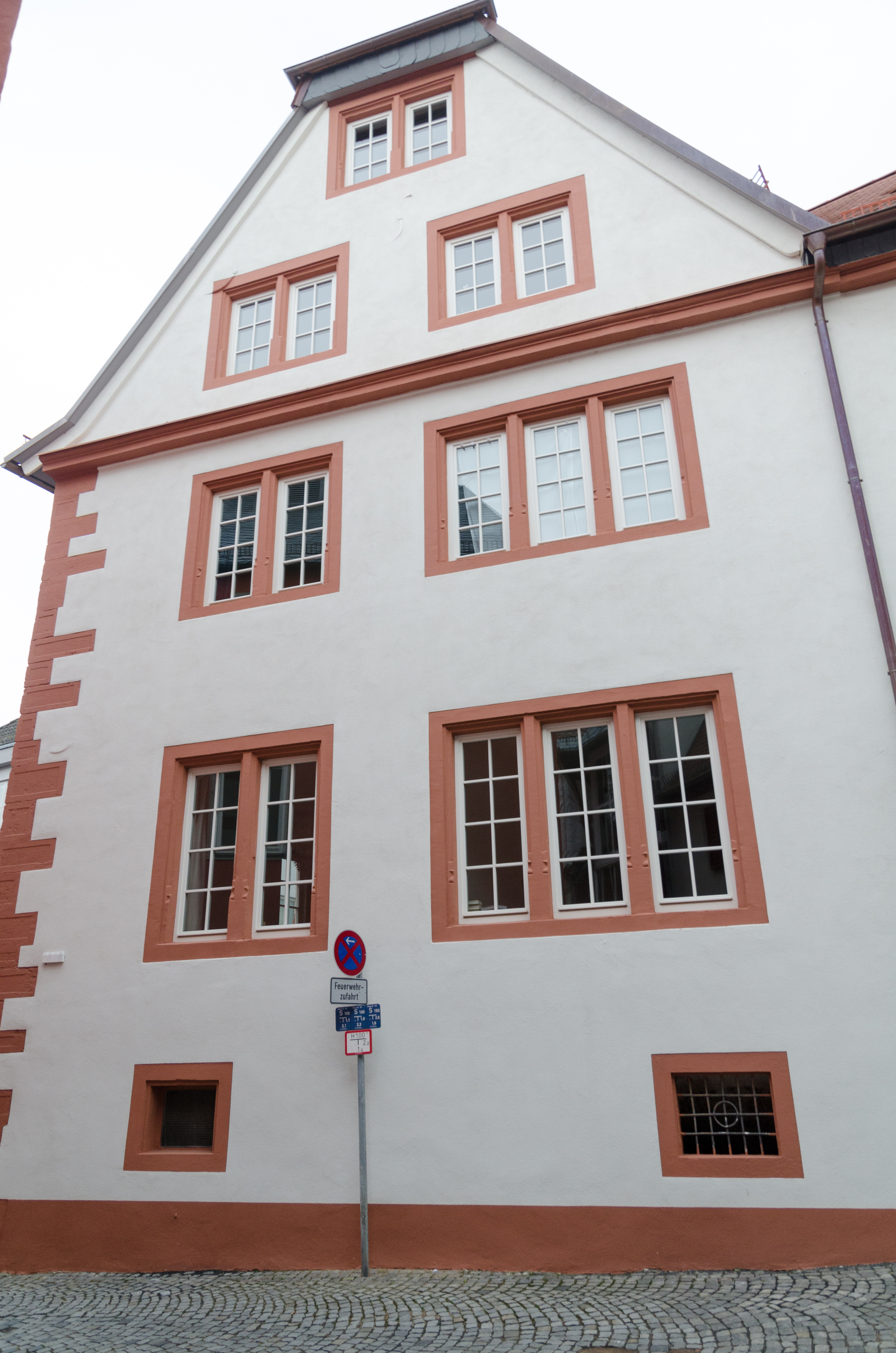 Aschaffenburg, Am Heißen Stein 3